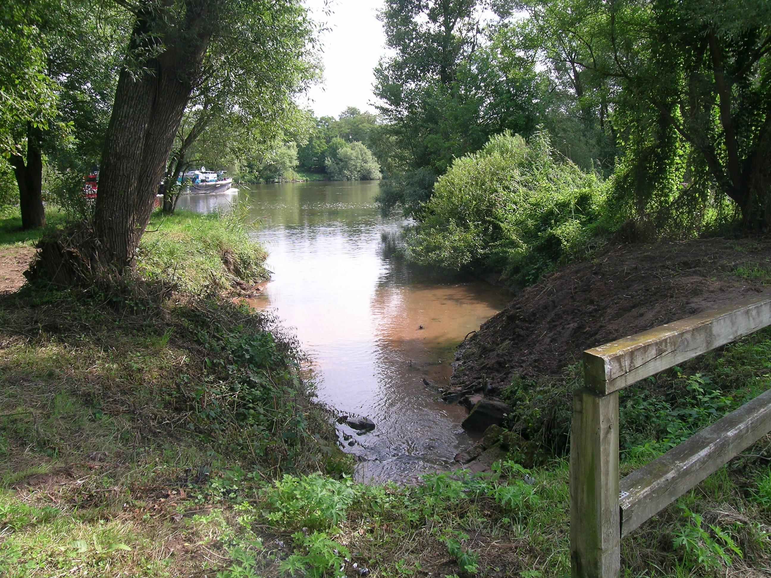 Mutterbach in Wörth am Main (Mündung in den Main)